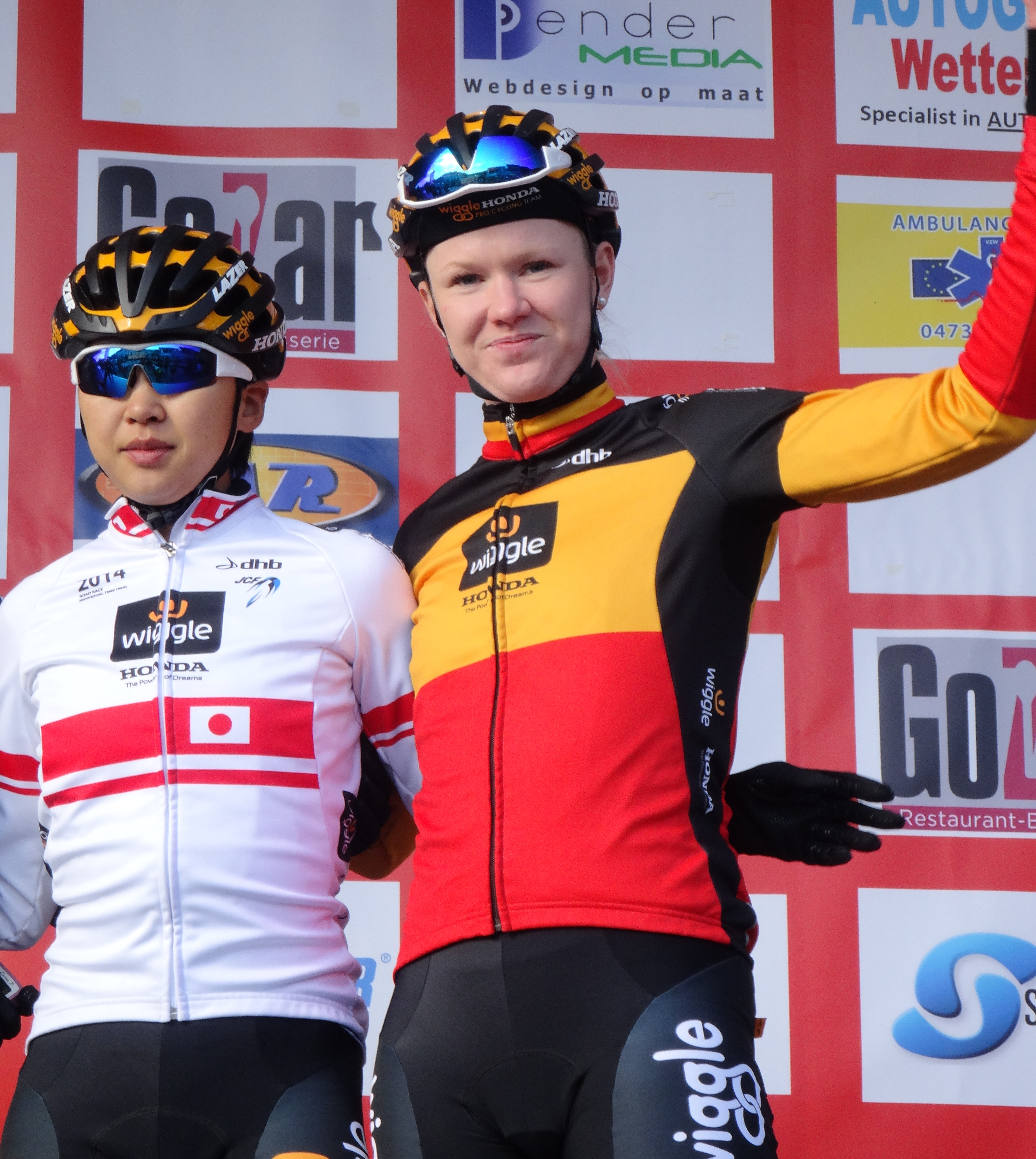 Reportage réalisé le mercredi 4 mars à l'occasion du départ du Samyn des Dames 2015 et du Samyn 2015 à Quaregnon, Belgique.